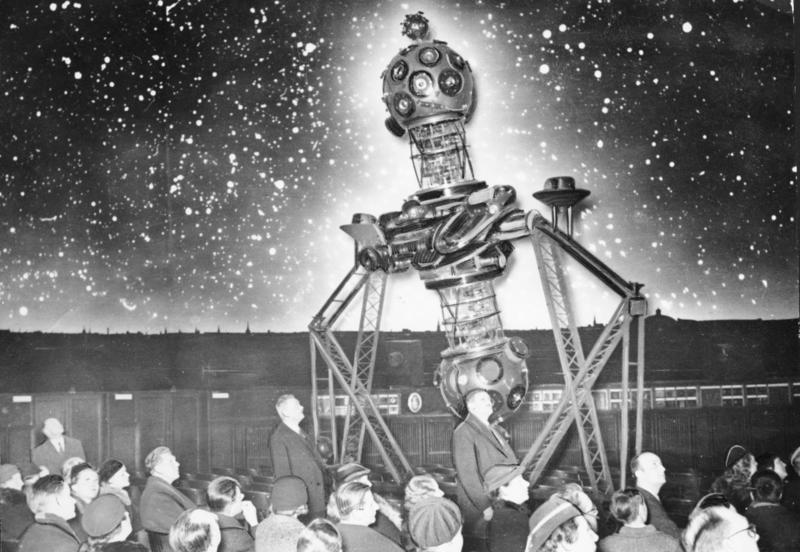 Berlin, Planetarium